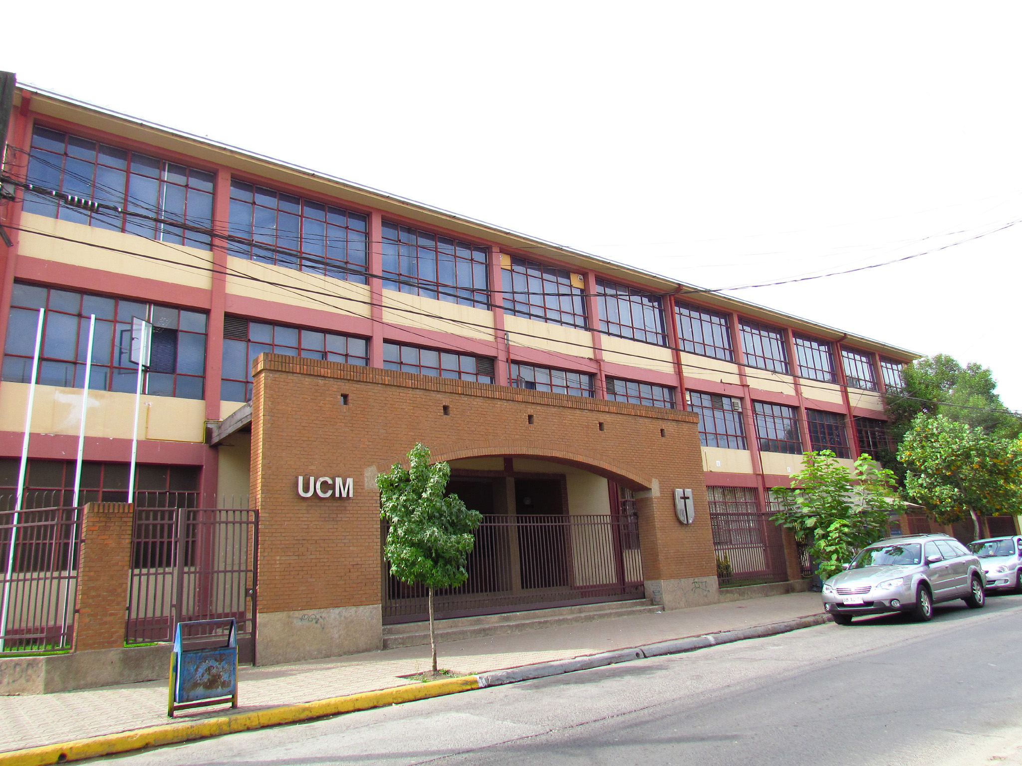 Curico, UCM en calle Carmen